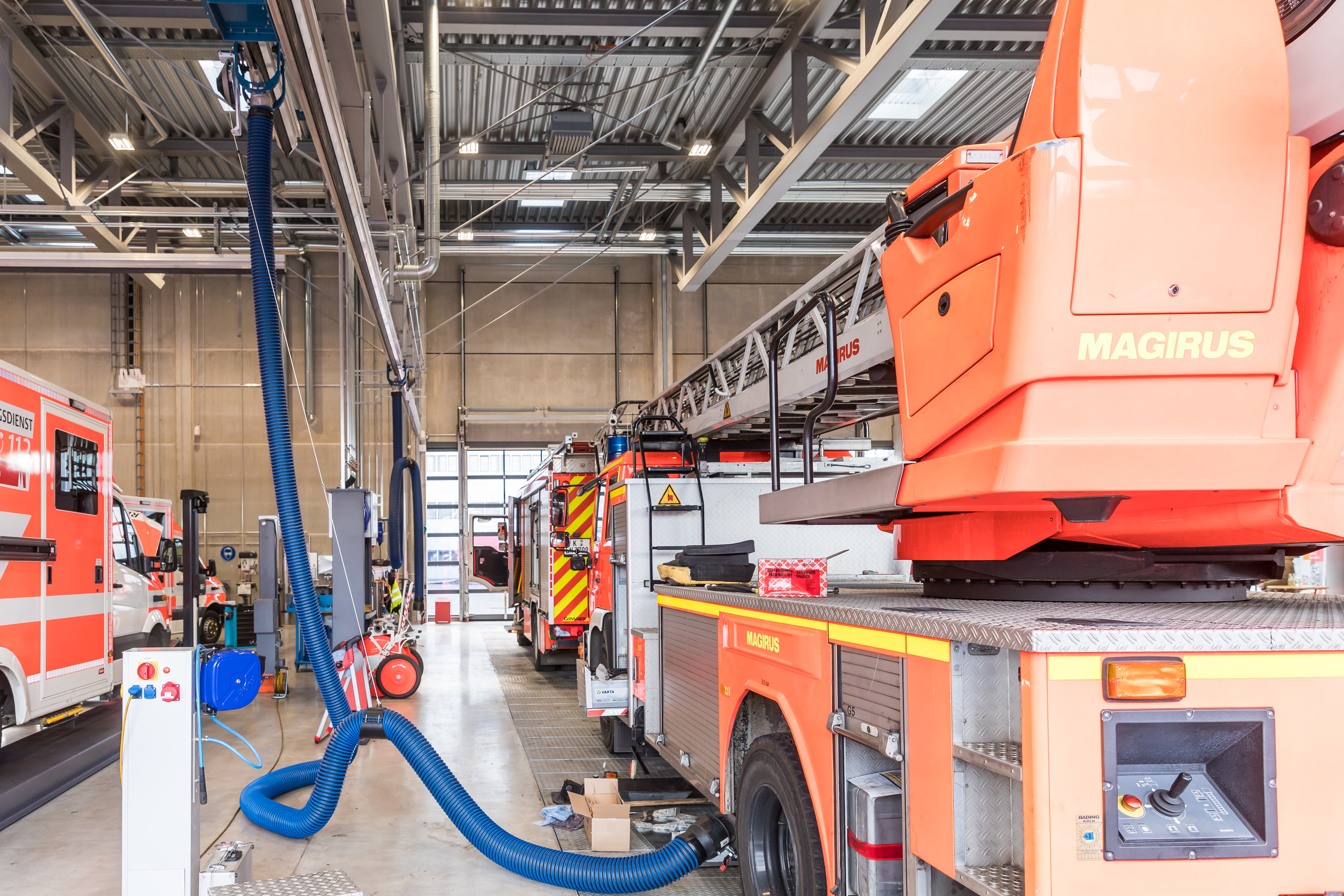 Feuerwehrzentrum Kalk - Drehleiter von Magirus in der Kfz-Werkstatt